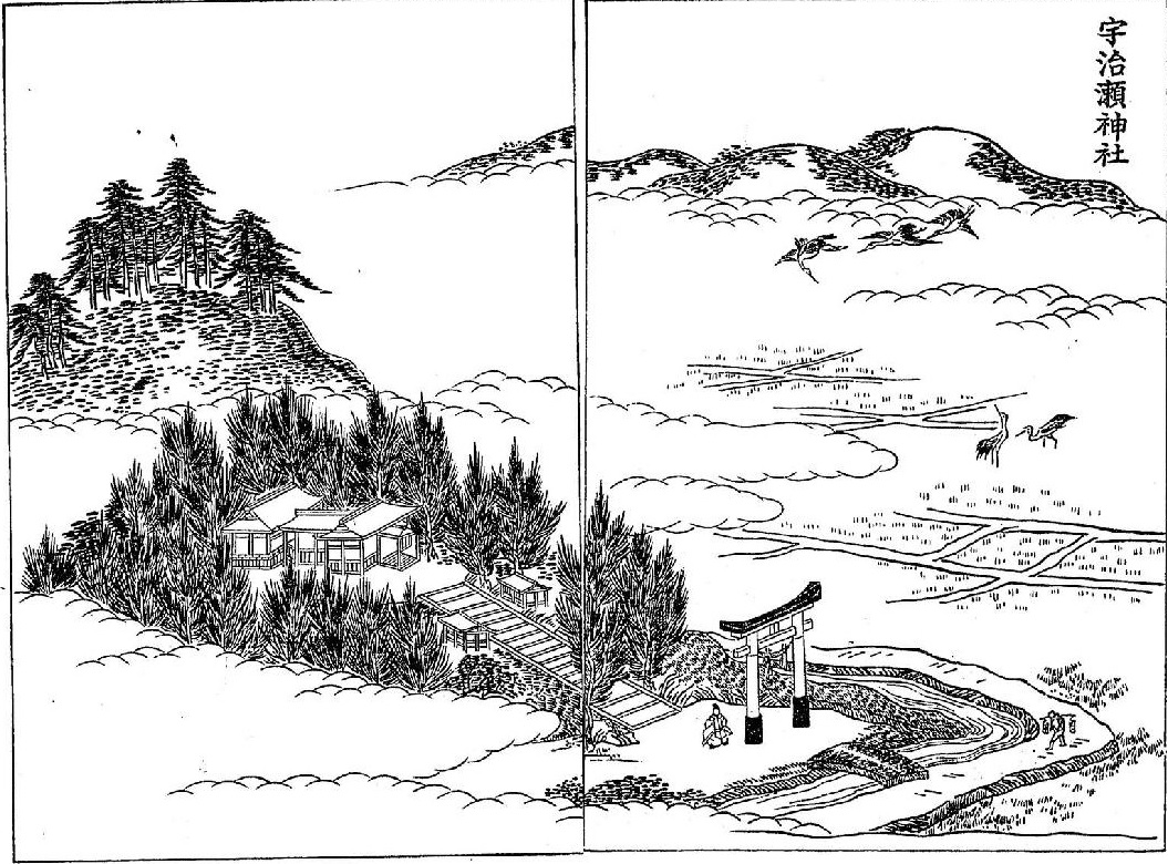 三国名勝図会第三巻に掲載されている宇治瀬神社（鹿児島神社）の江戸期の絵図。